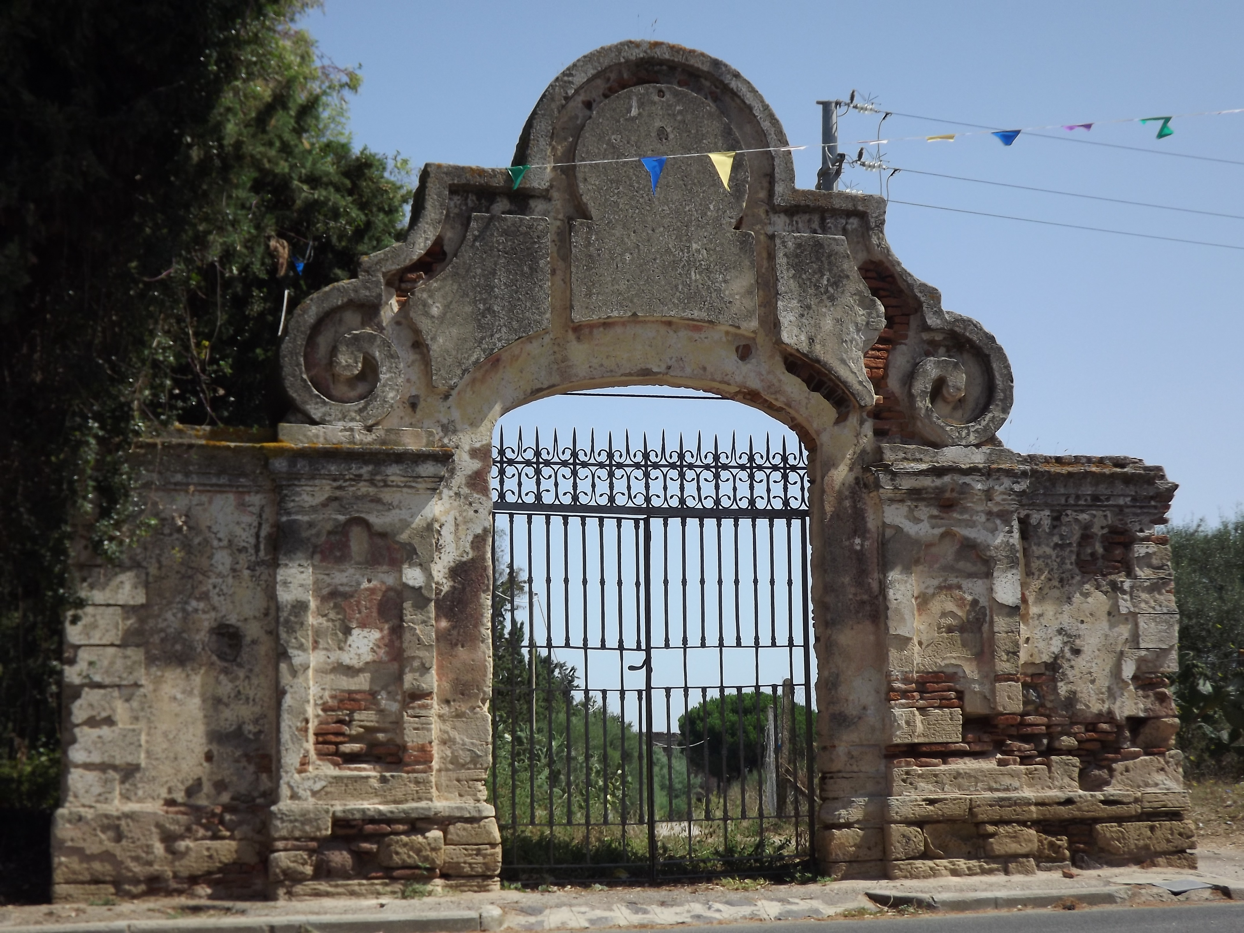 Donigala Fenughedu, frazione di Oristano: il portale di Loffredo. L'autore sono io, ovvero Fabio Loddi. La foto è stata da me scattata quest'estate e ho deciso di mettere il file con la licenza di pubblico dominio.